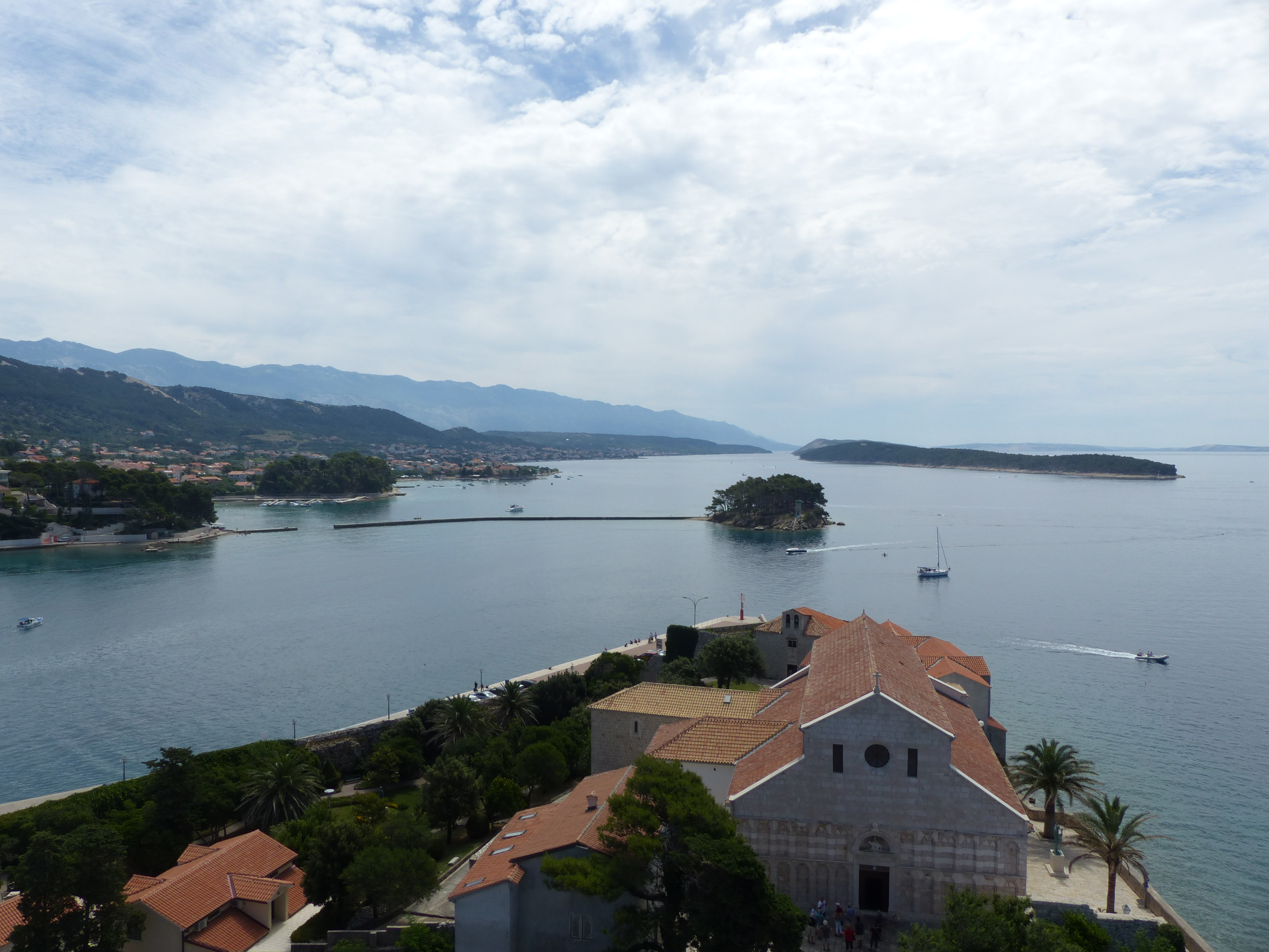 A felvétel 2016. június 30-án készült Rab városában. Rab sziget, Horvátország. Kilátás a Harangtoronyból a városra és környékére.